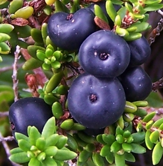 Empetrum nigrum (Tatra Mountains, Grześ)